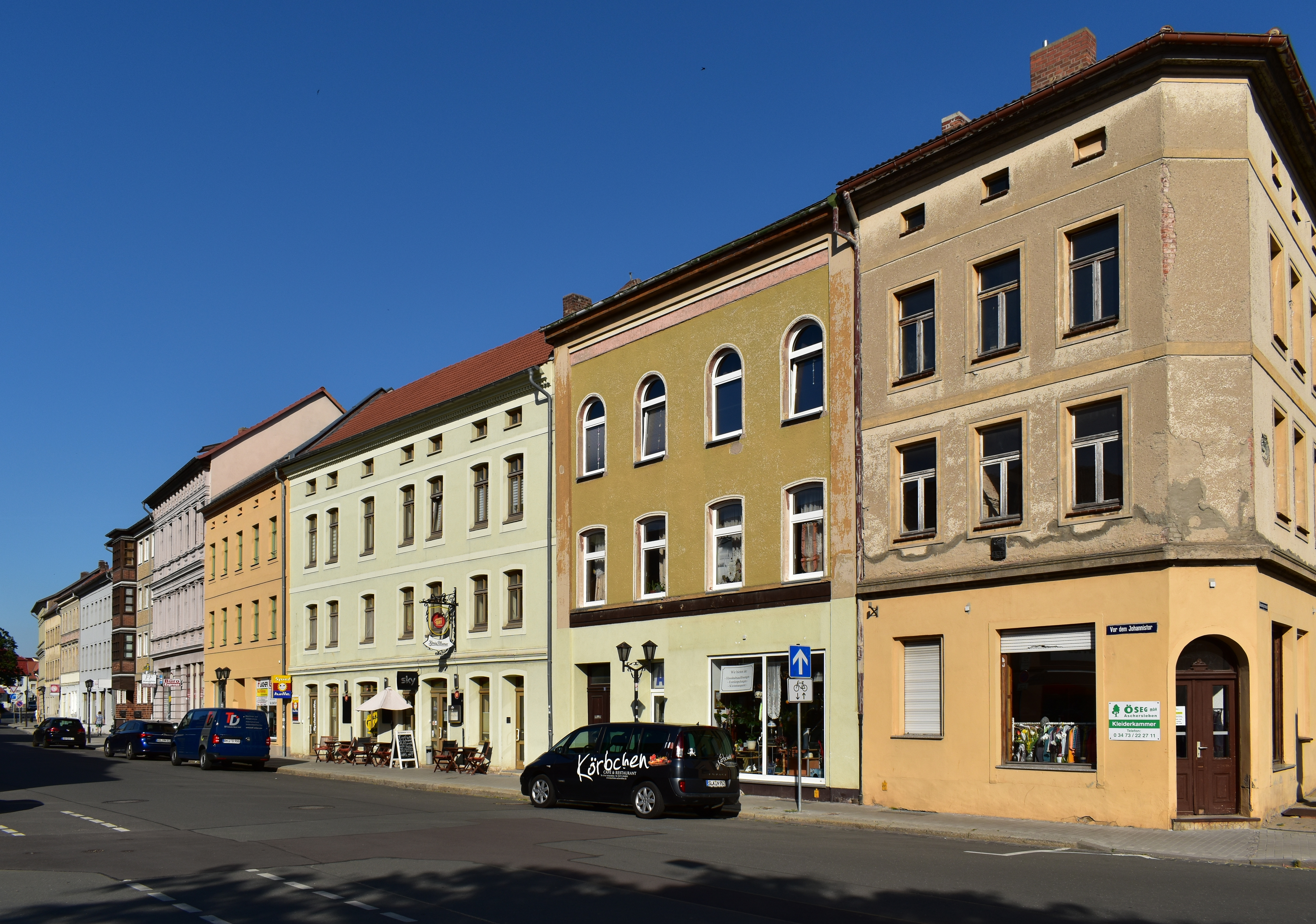 Gebäude Vor dem Johannistor 3-7 in Aschersleben